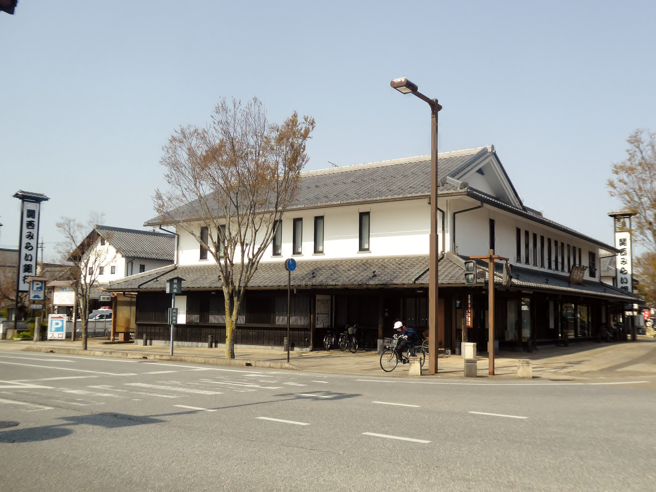 関西みらい銀行彦根支店を撮影。 Panasonic Lumix DMC-TZ60